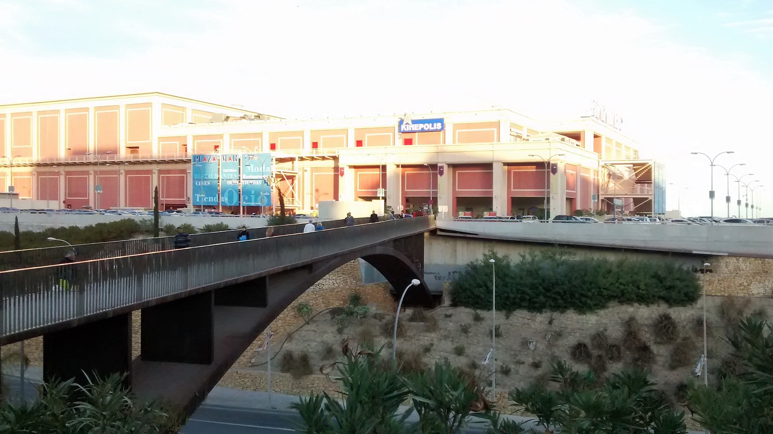 Centro comercial Plaza Mar 2, Alicante (España).